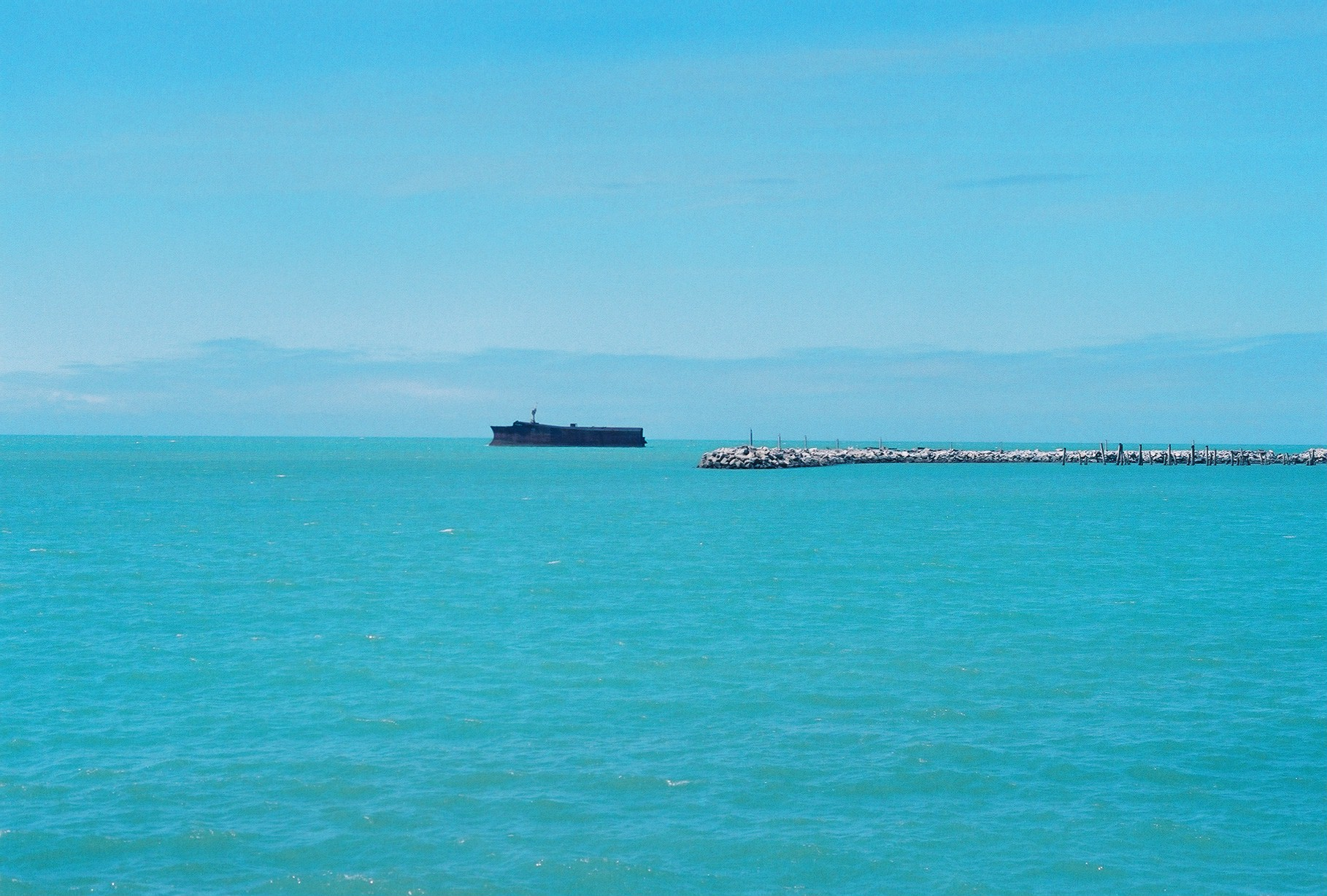 Mar em Fortaleza